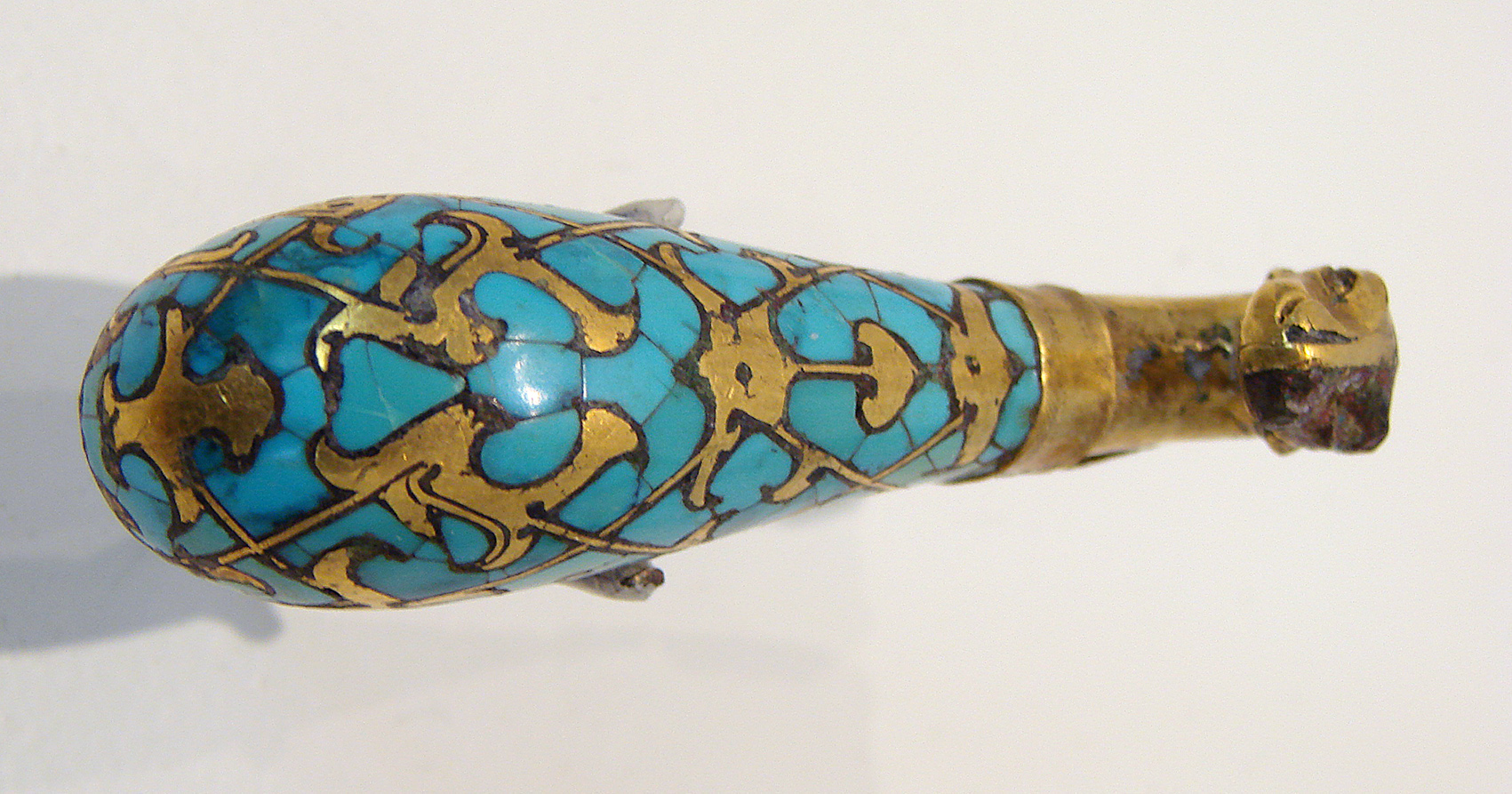 Agrafe courte en forme de luth. Bronze, feuille d'or et d'argent, turquoise. Longueur 7 cm. Époque des Royaumes Combattants, 4ème-3ème siècle avant notre ère. Musée Guimet, Paris. Musée Guimet : Collection : Agrafe...